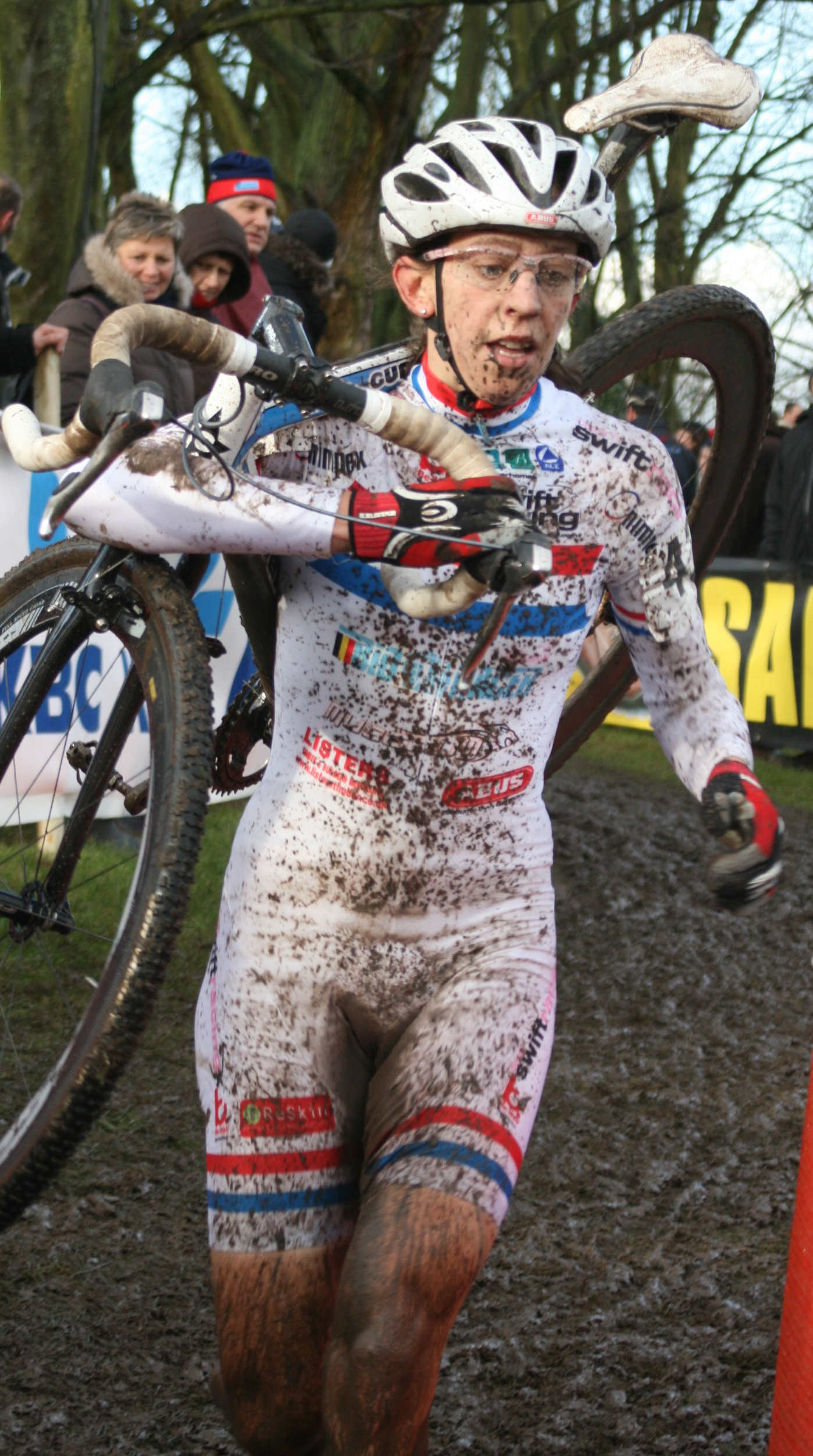 Helen Wyman, au Grand Prix Lille Métropole 2009